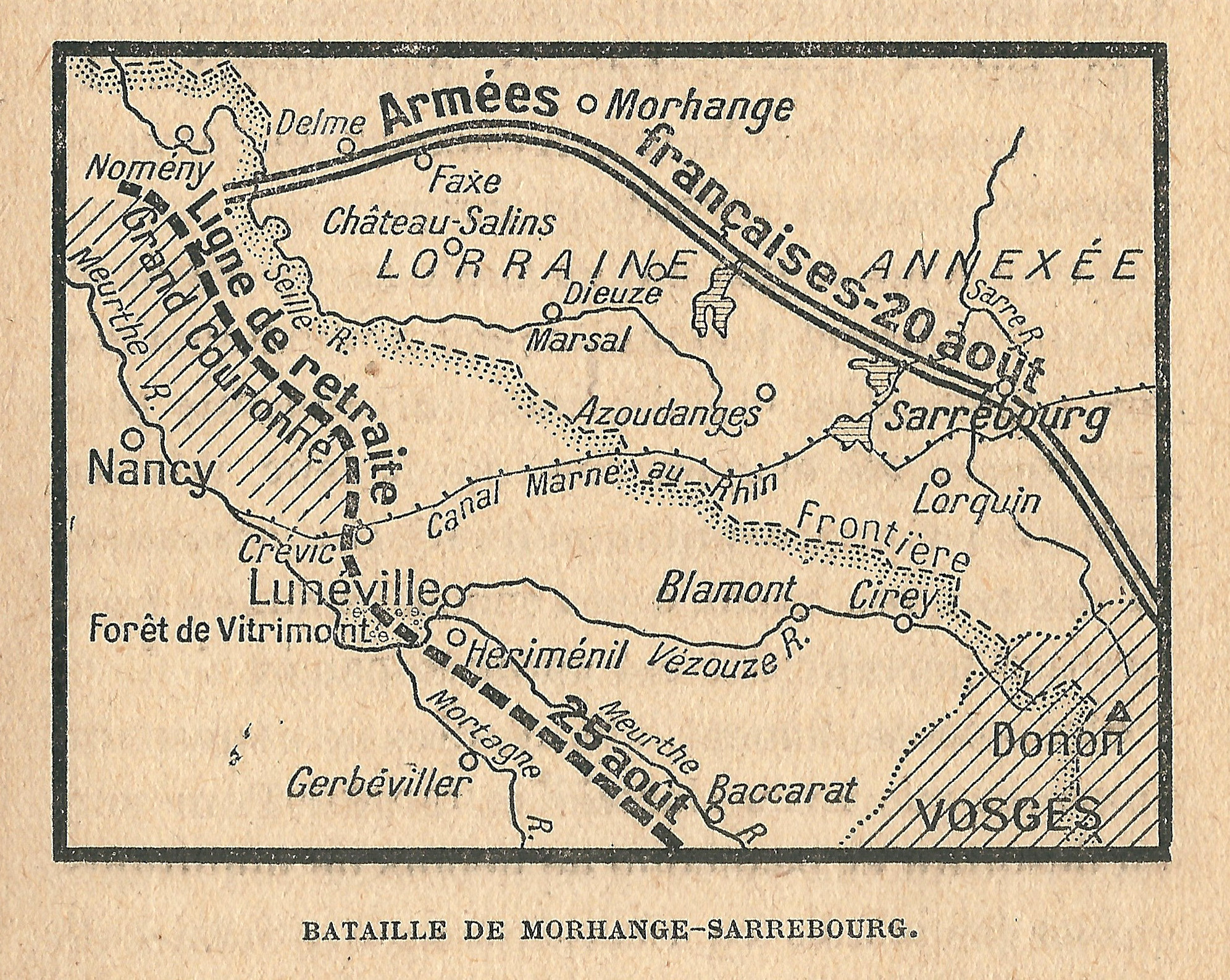 carte qui représente l'offensive